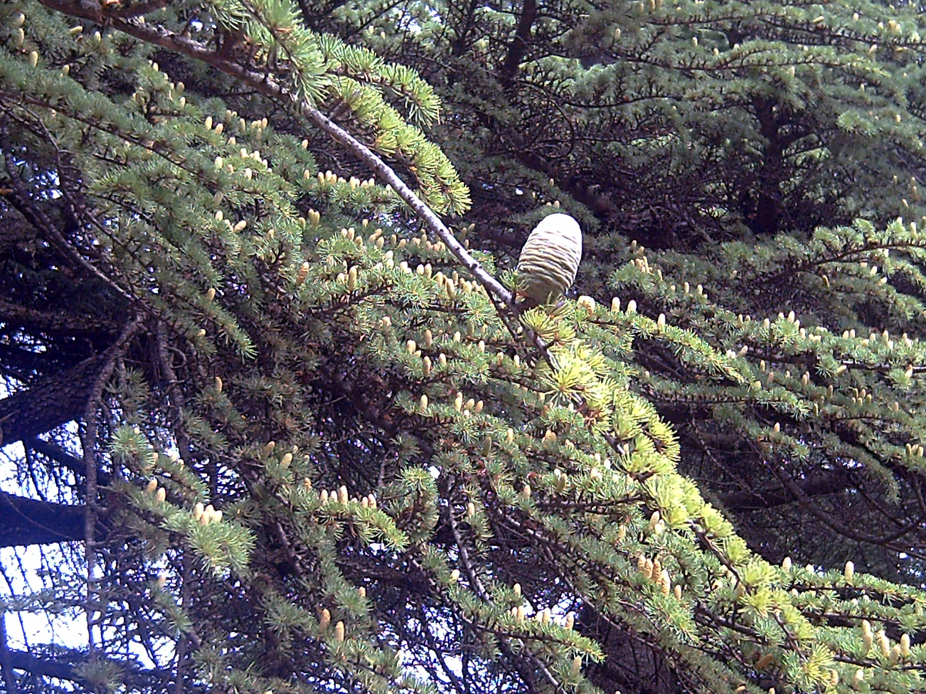 Cedrus libani var. atlantica (Atlas Cedar) female cone in Arboretum La Alfaguara